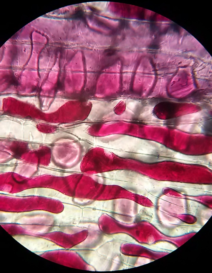 L'effetto della plasmolisi visto al microscopio con cellule di Allium cepa